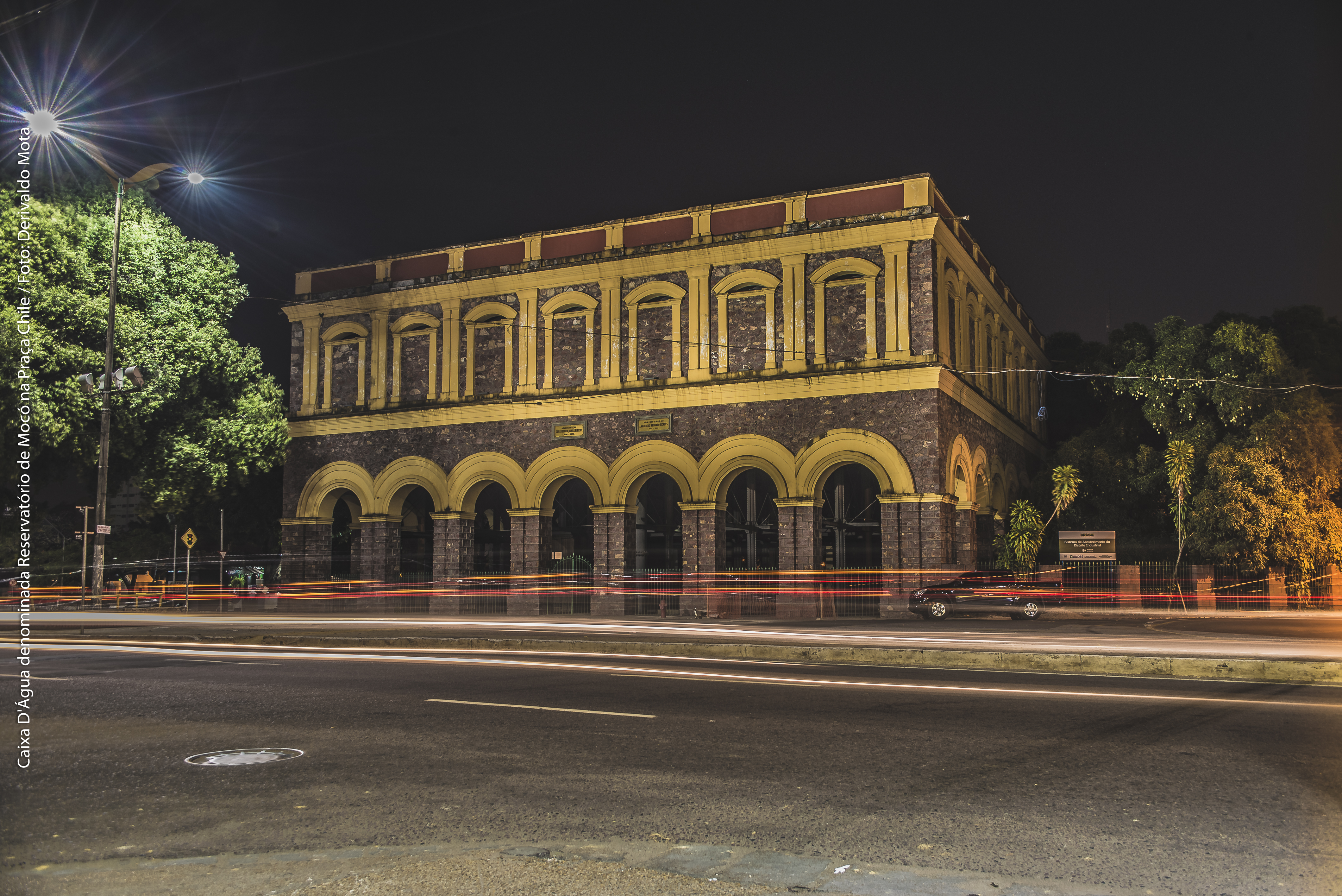 Caixa D'Água denominada Reservatório de Mocó na Praça Chile